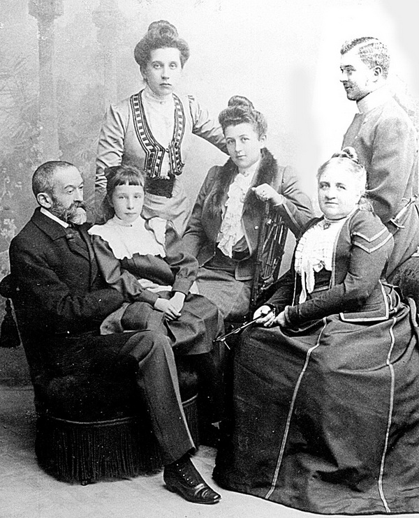 Василий Алексеевич Капнист (1838-1910) с женой Варварой Васильевной (1841—1922), детьми: Елизаветой (1868-1944), Варварой (1870-1960), Алексеем (1879-1958) и внучкой Варварой Владимировной Мусиной-Пушкиной (1892—1970)